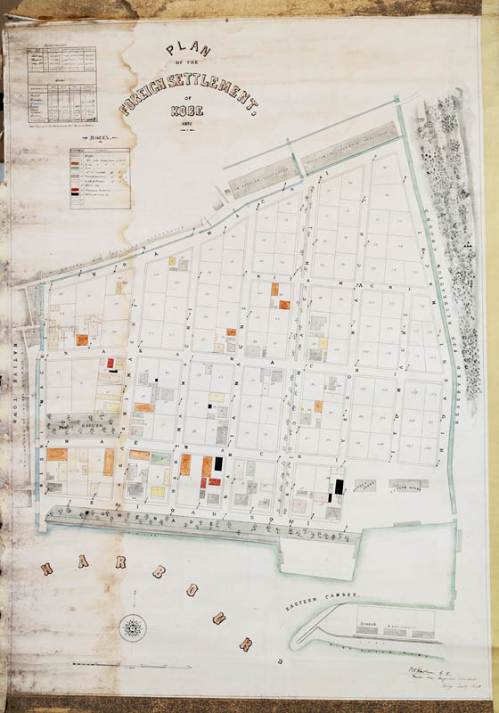 神戸外国人居留地計画図（Plan of the Foreign Settlement of Kobe）